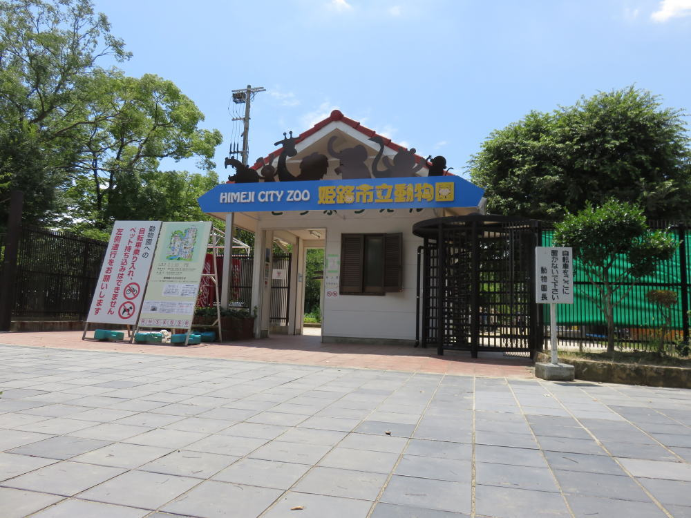 姫路市立動物園の北側出入口。